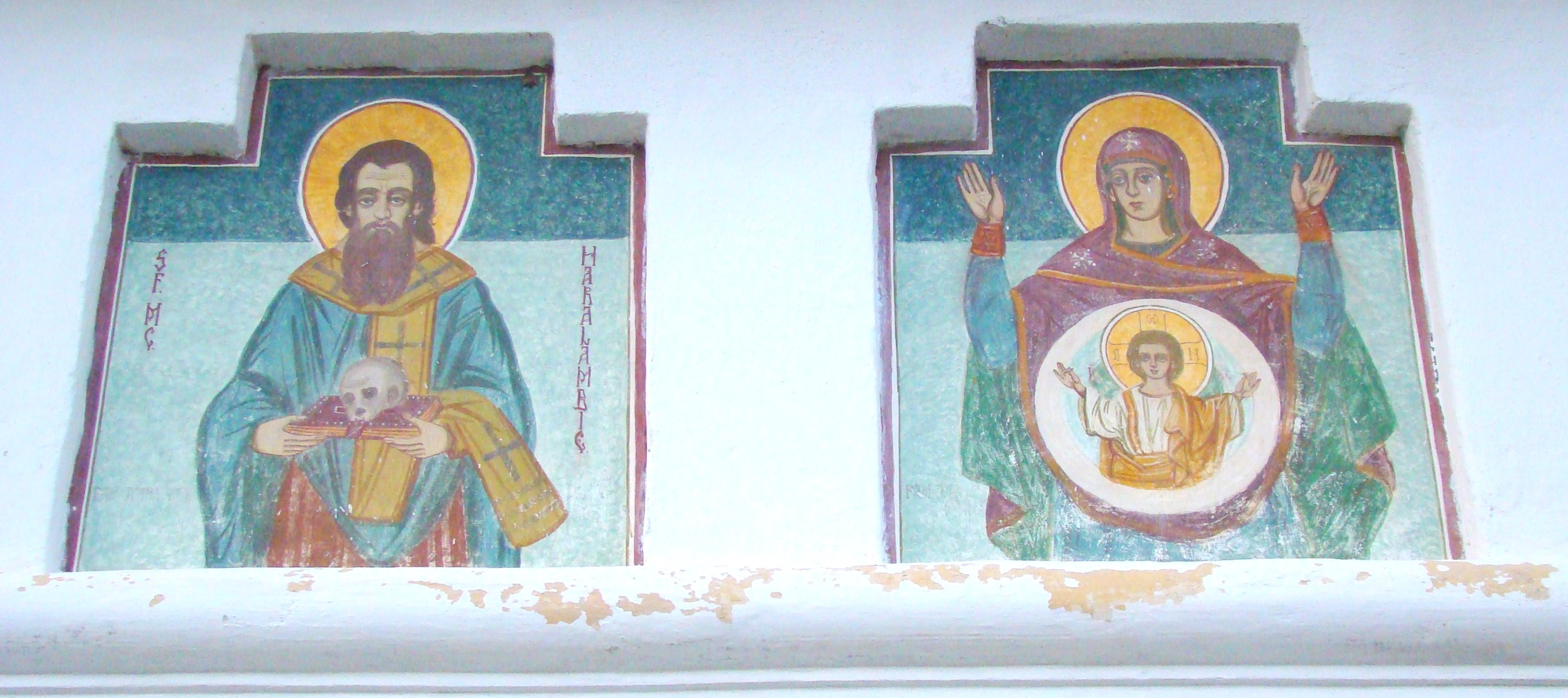 Biserica Sfântul Nicolae din Orlatt, județul Sibiu